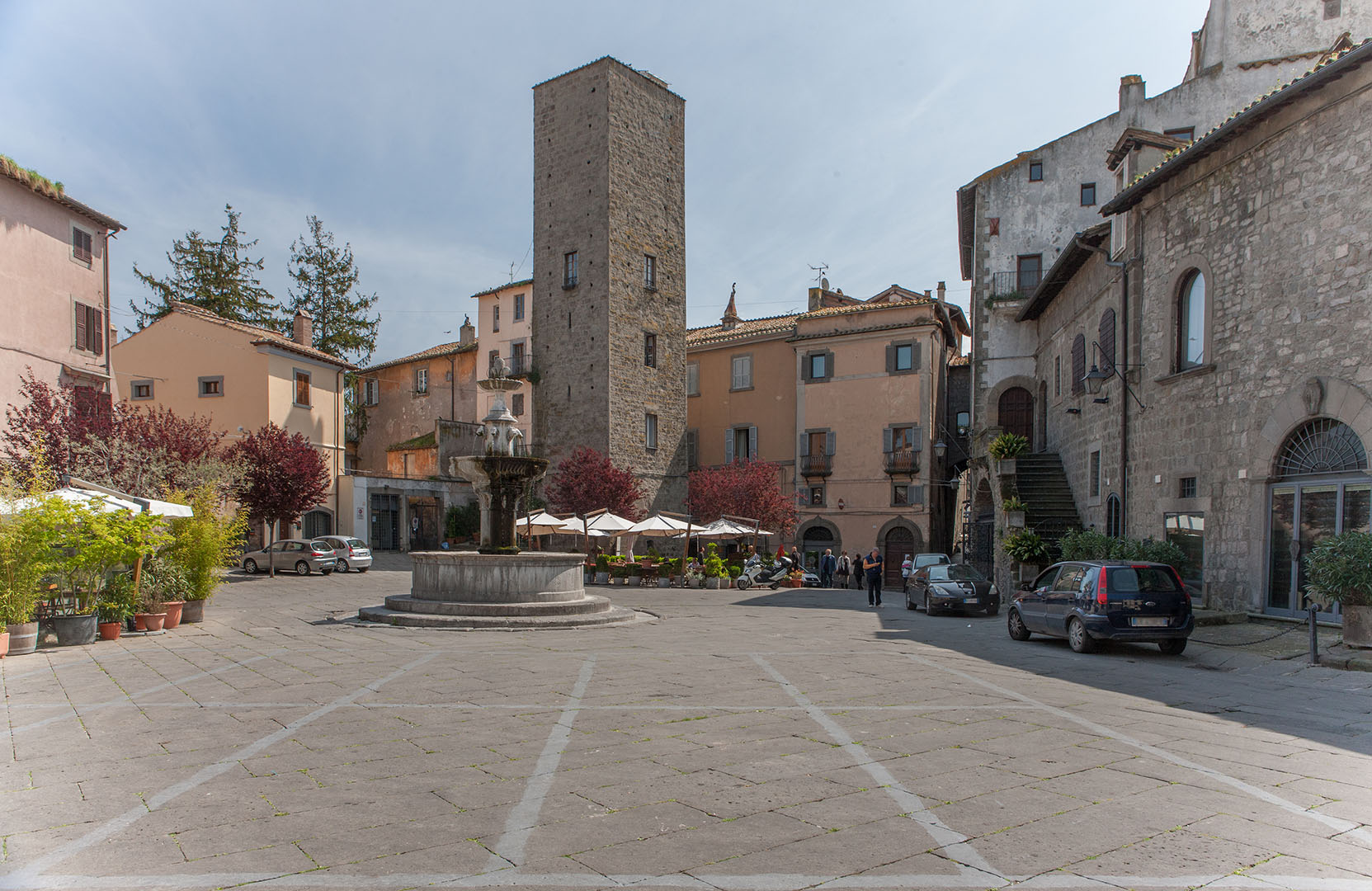 Piazza del Gesù con la Torre del Borgognone